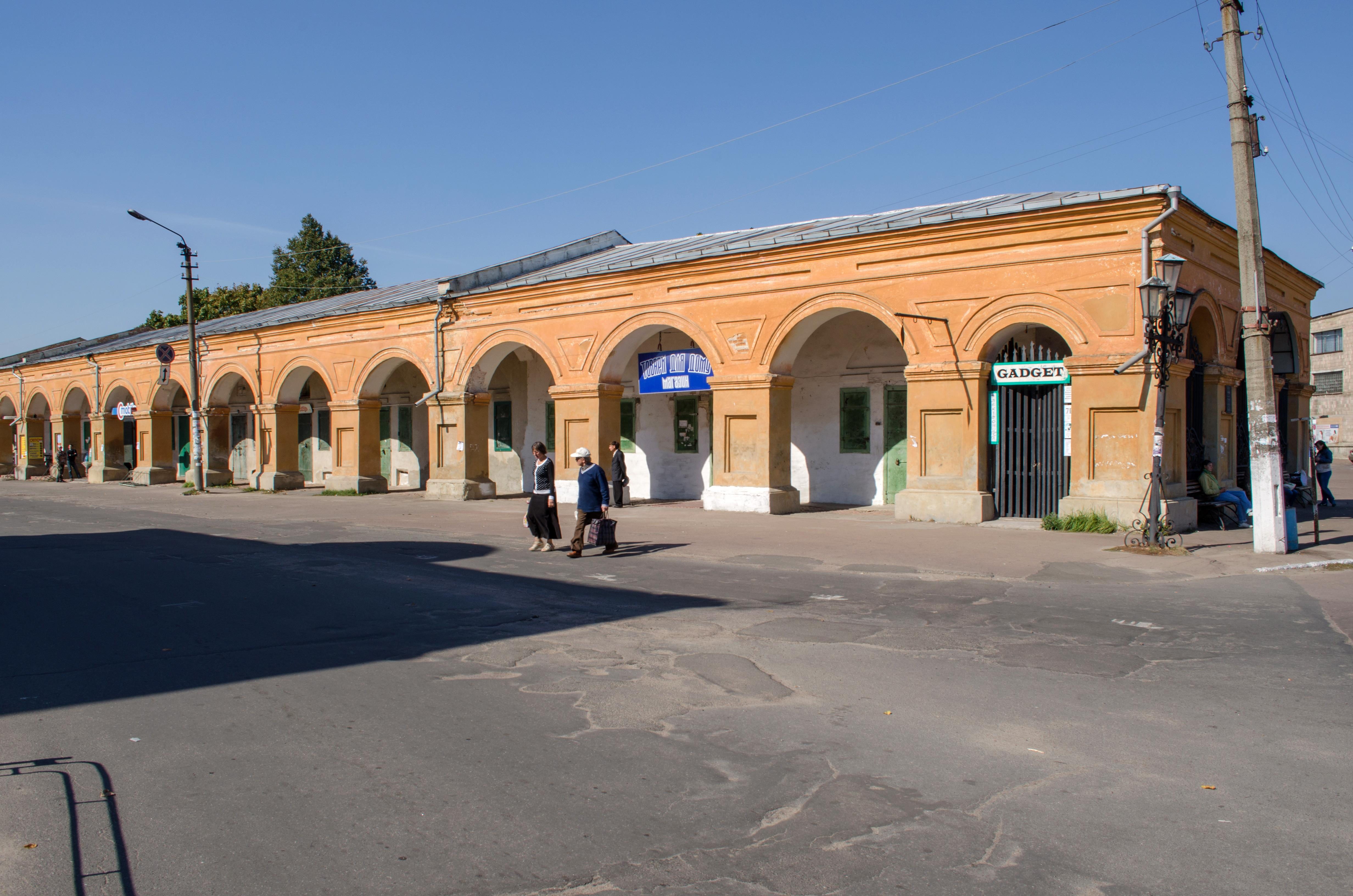 Торгові ряди (мур.), Новгород-Сіверський, вул. Базарна (кол. 50-річчя Жовтня), 2, 4